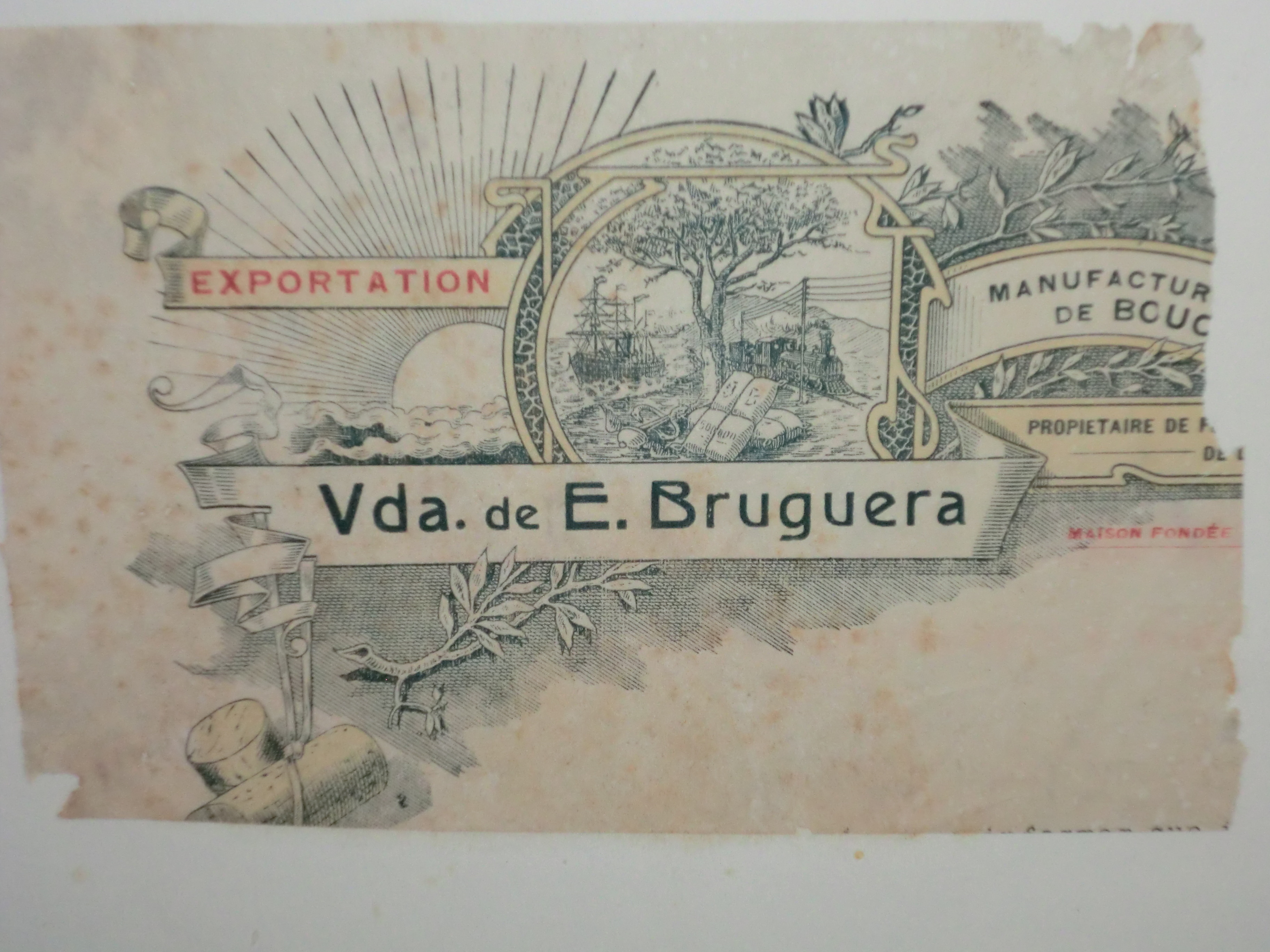 Logo fàbrica taps duro Vda. de E. Bruguera